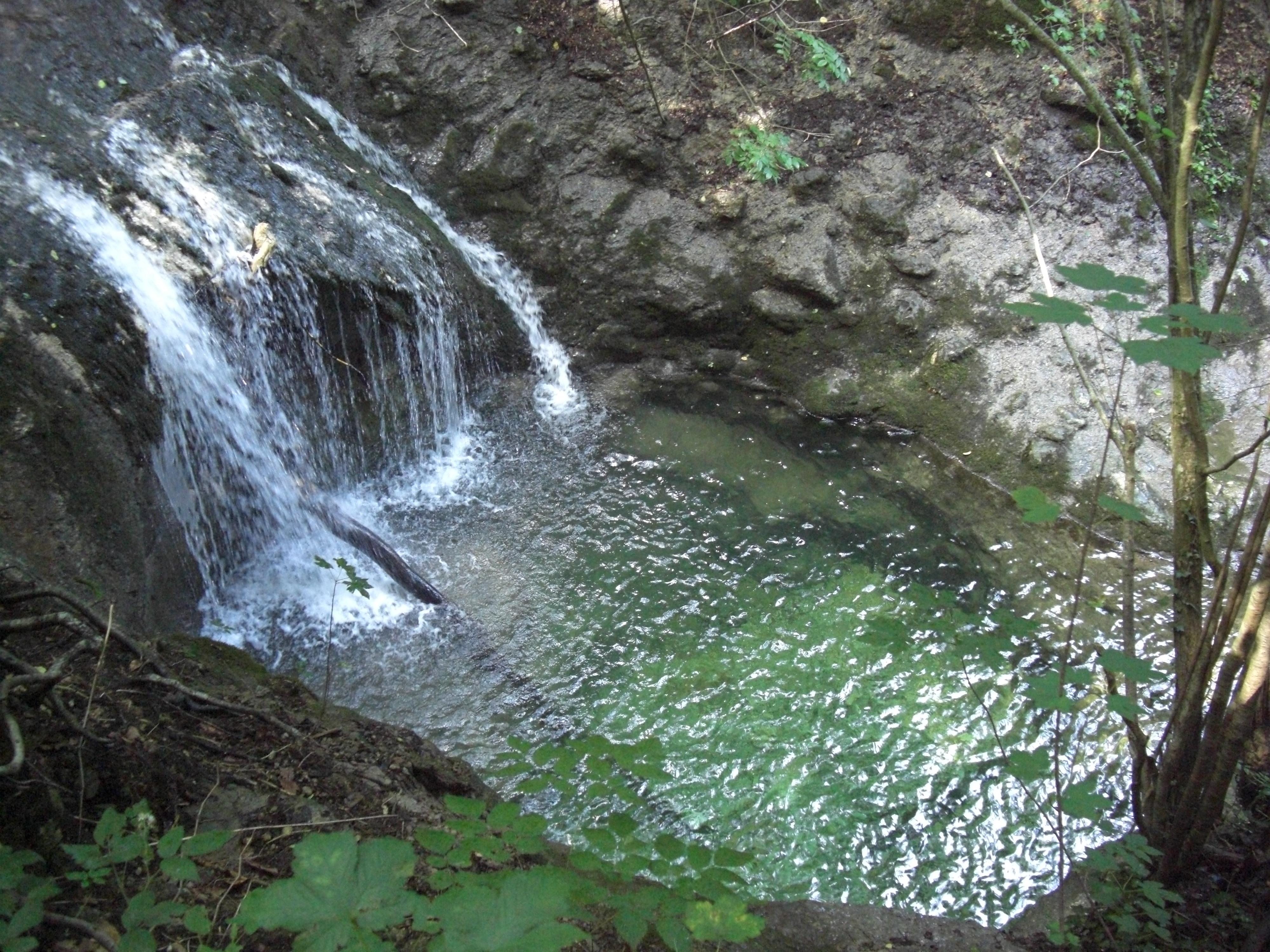 Stadlerkessel in Elsbethen This media shows the natural monument in Salzburg with the ID NDM00062.